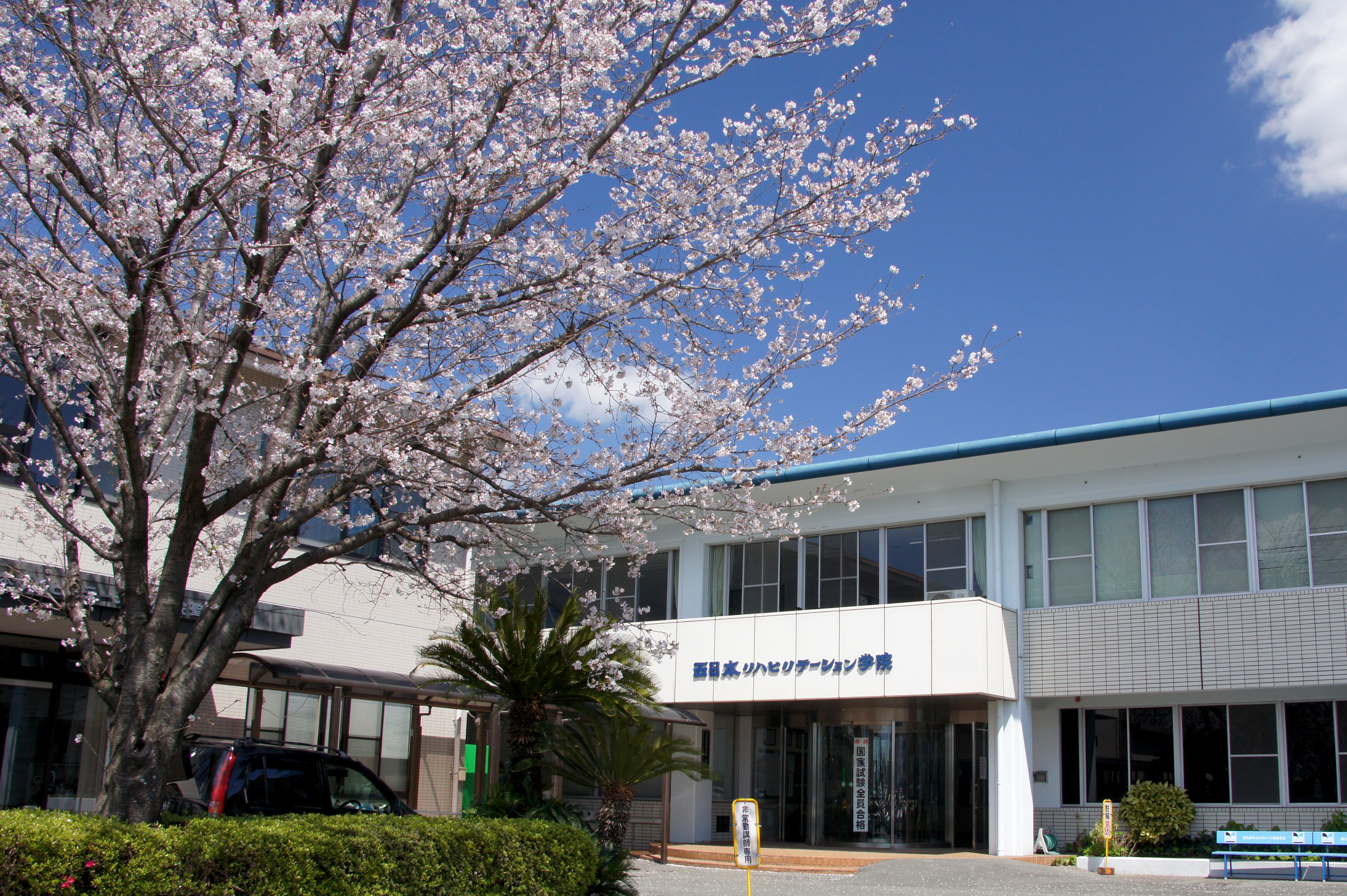 西日本リハビリテーション学院の画像